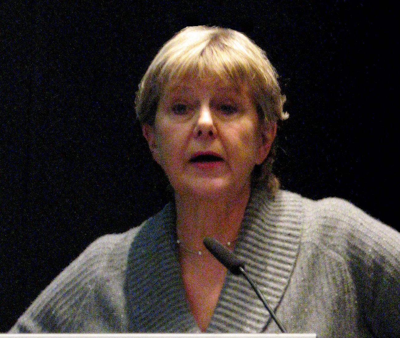 Marianne Birthler, 24. November 2009